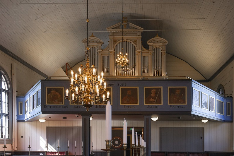 Korpilahden kirkon urut ovat vuodelta 1904. Parvien kaiteissa olevat C.F. Blomin tekemät maalaukset ovat vuodelta 1839.